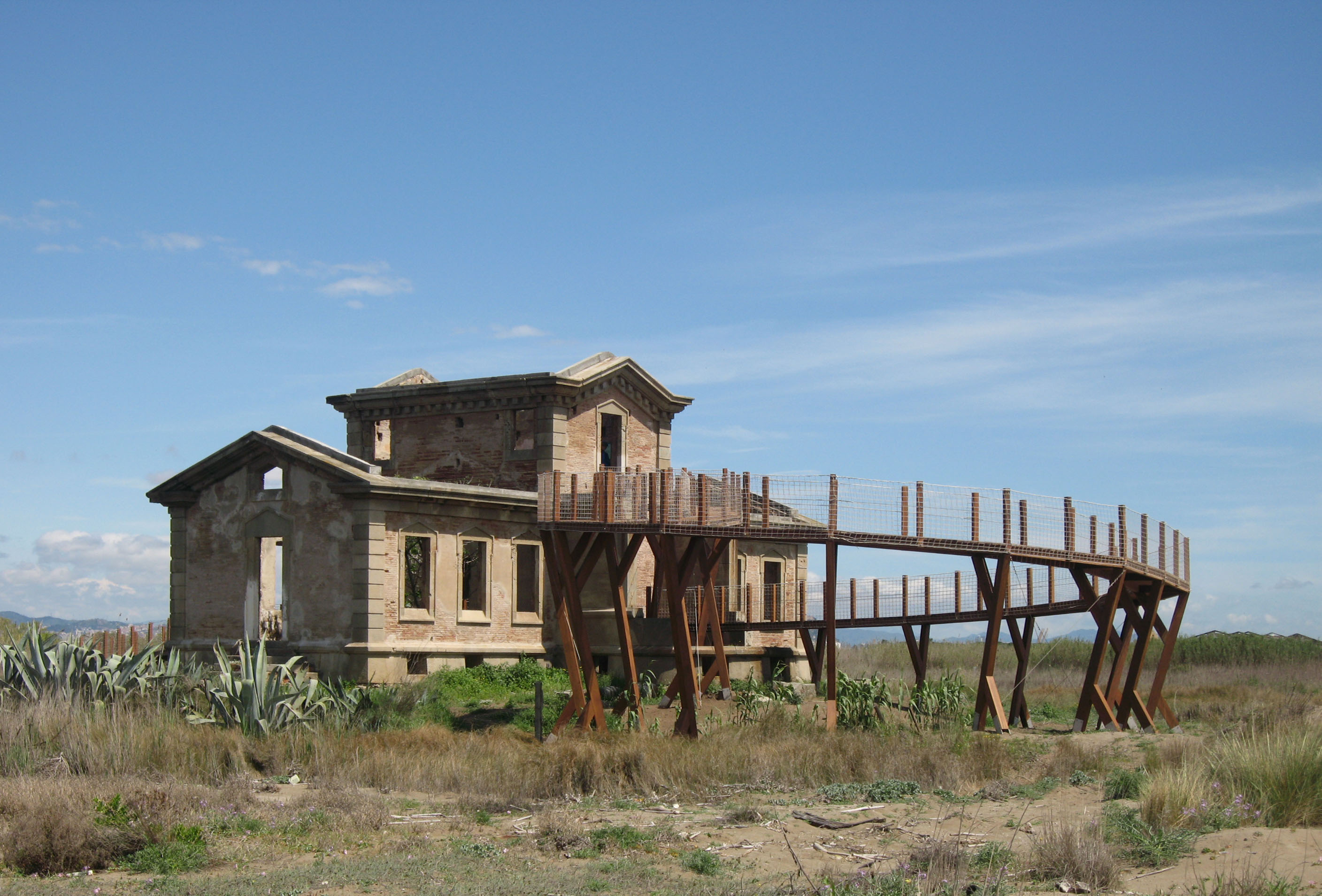 Casa Semáforo, convertida en mirador de aves. Ubicado en la playa de Ca l'arana. Reserva natural del Delta del Llobregat